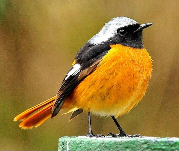 黃尾鴝Phoenicurus auroreus male 拉丁學名：Daurian Redstart